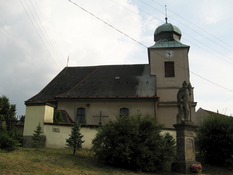 Kostel svatého Jiří, Svatý Jiří (okres Ústí nad Orlicí).